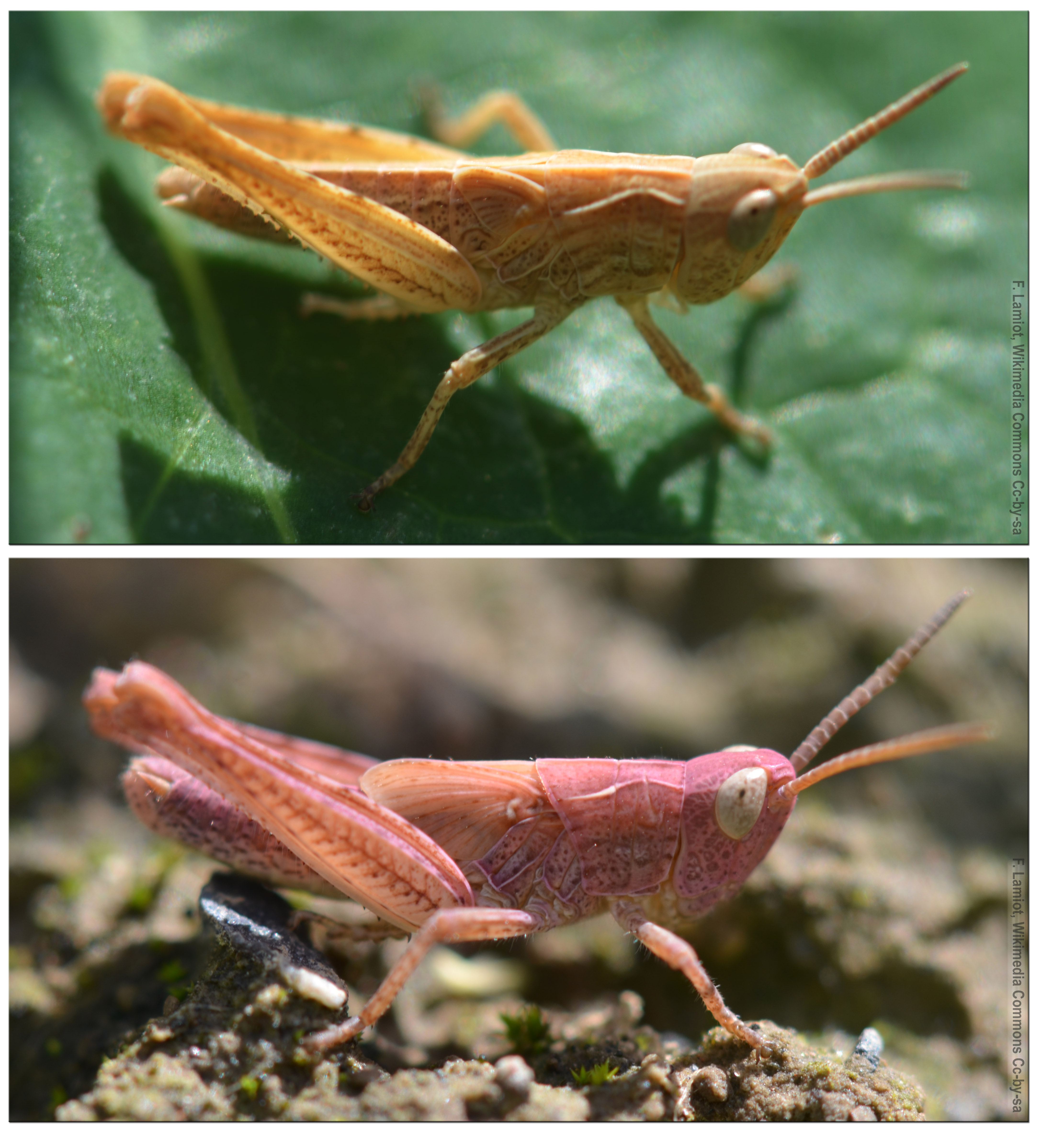 Criquets probablement du genre Chorthippus, dont plusieurs spécimens juvéniles roses à rose-violacés ont été observés en ville à Lille, quartier du bois habité, dans une parcelle de quelques mètres carrés, non eutrophe, engazonné, en ensoleillée, plantée de deux jeunes bouleaux Une dizaine d'individus au moins, dont plusieurs de couleurs nettement rose ont été observés (avant girobroyage quelques jours plus tard).. Unknown